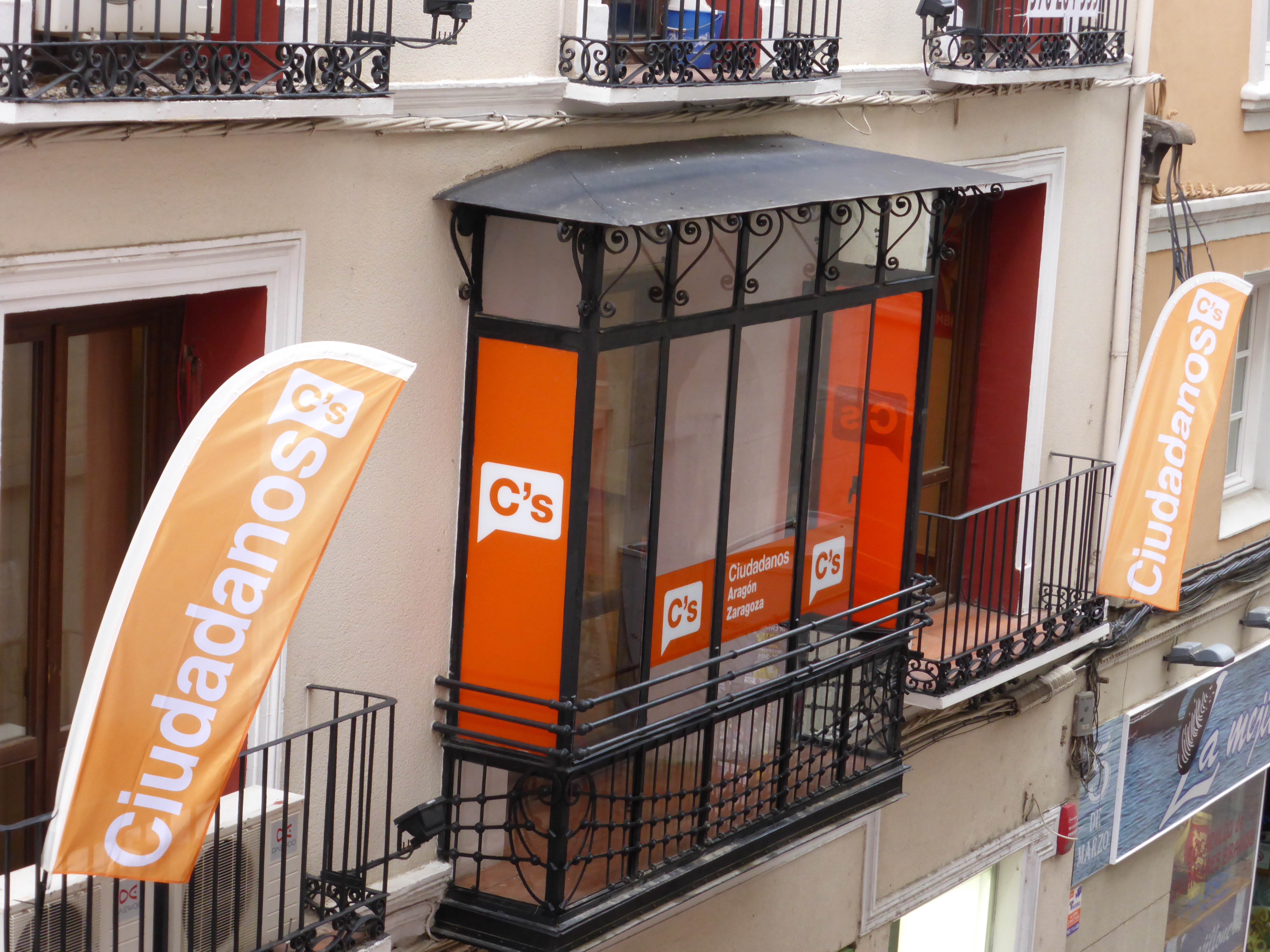 El partido político "Ciudadanos", nacido en Cataluña, ahora actúa en toda España. En 2015 ha entrado con 5 escaños en las Cortes de Aragón. En esta fotografía vemos el exterior de su sede en la ciudad de Zaragoza, en la calle Cinco de Marzo.